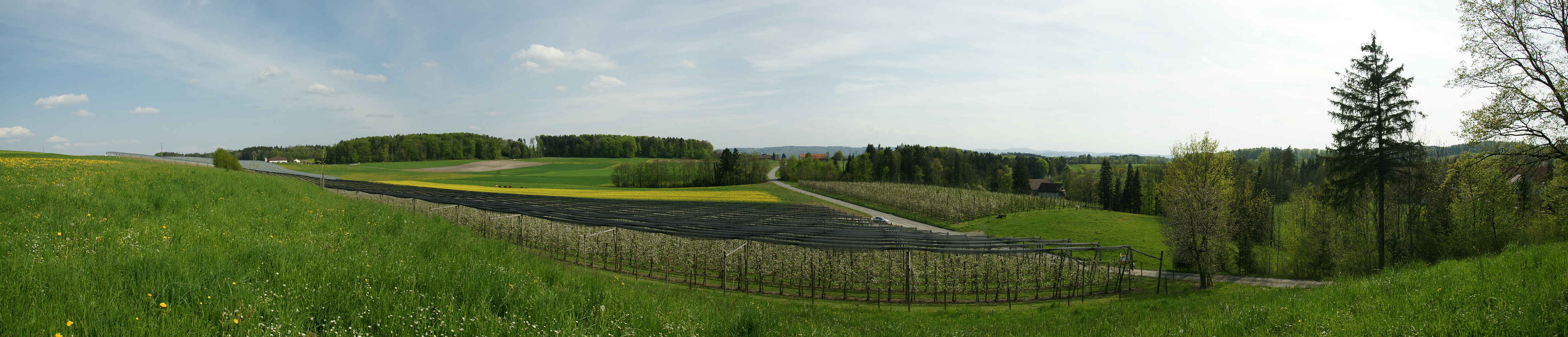 An der Strasse von Müllheim nach Steckborn zwischen den Dörfern Ober Hörstetten und Hörhausen. Diese Typische Thurgauer Landschaft auf dem Seerücken. Panorama aus 4 Querformataufnahmen vom 4. Mai 2008 16:09 Uhr. EXIF Daten der ersten Aufnahme: 04.05.2008 16:44 Uhr 1/500 s - f/9 - ISO 200 - 24 mm KB. Aufnahmestandort: Abseits des Weges in einer Wiese oberhalb einer Obstplantage. 552 m - 715553 / 276787. (47° 37' 53.62" N, 8° 58' 34.05" E (47.631561°, 8.976125°.))